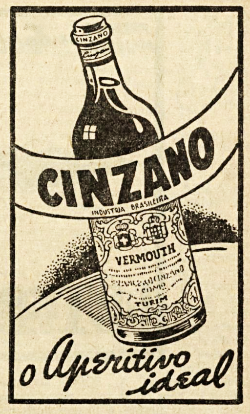 Propaganda do "vermuth" Cinzano, Brasil, 1944.